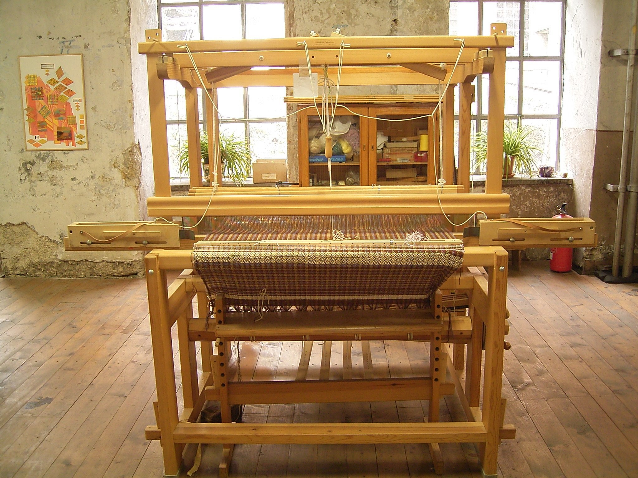 Wülfing-Museum in Radevormwald-Dahlerau